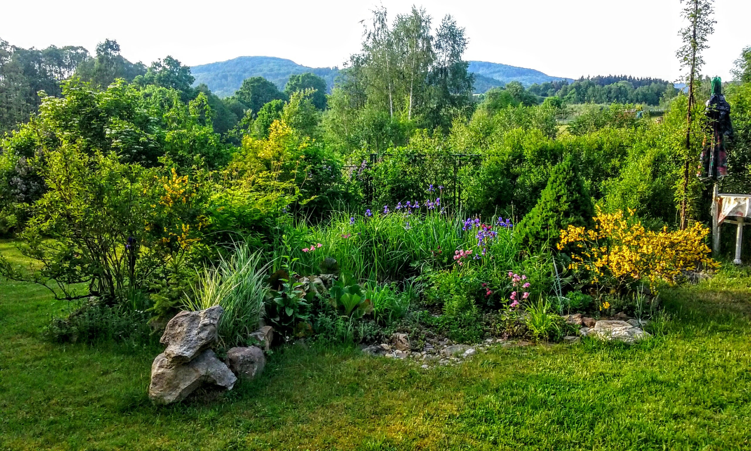 Horní Libchava, zahrádky s pohledem na Slunečnou, 2017